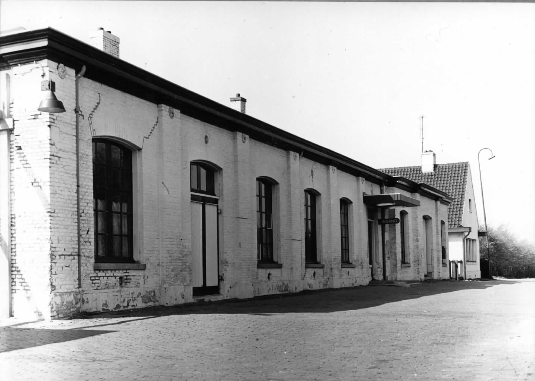 Gezicht op het N.S.-station te Anna Paulowna.